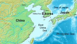 Ostchinesisches Meer